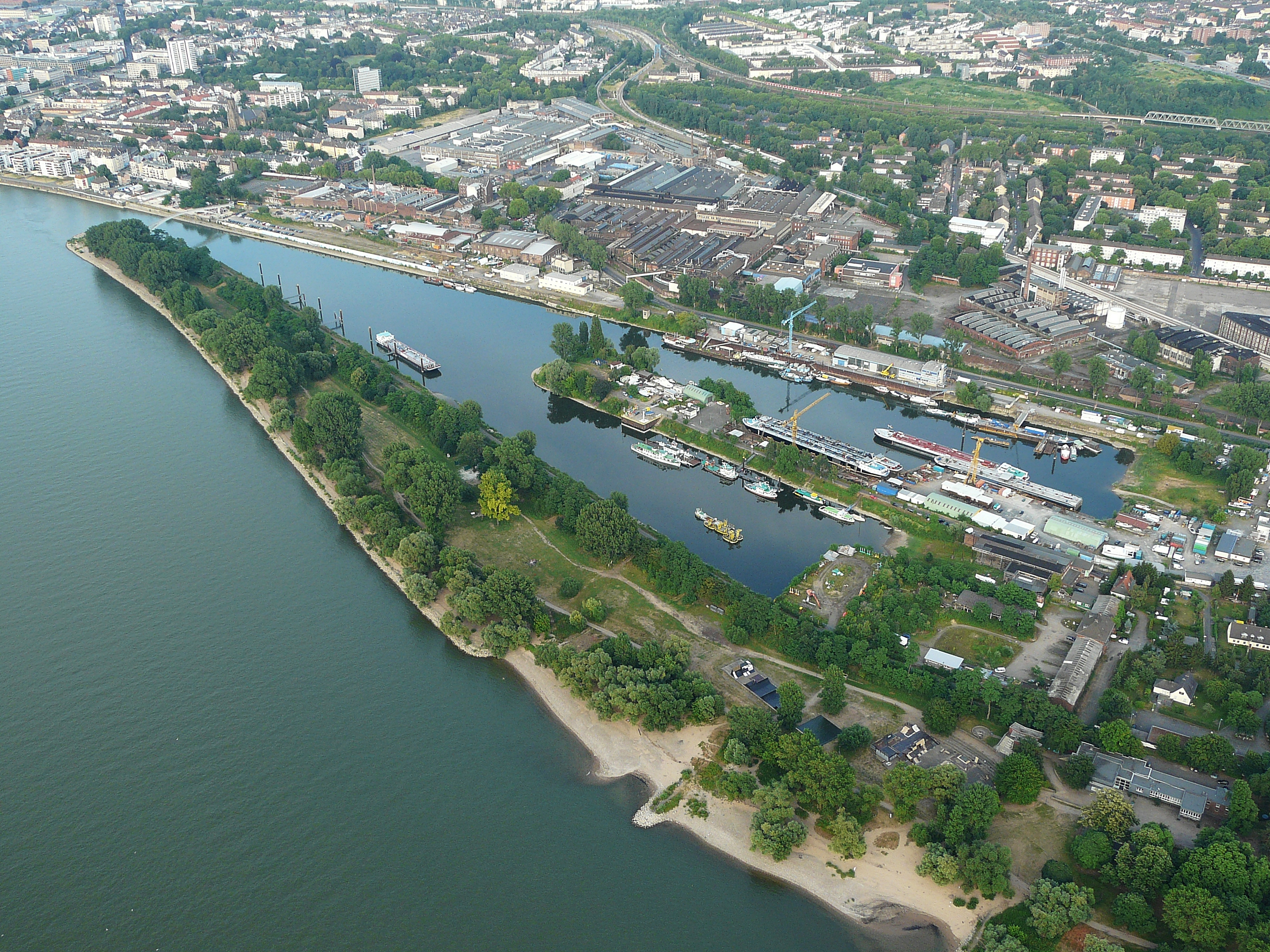 Der Mülheimer Hafen, im Hintergrund das Motorenwerk der Deutz AG